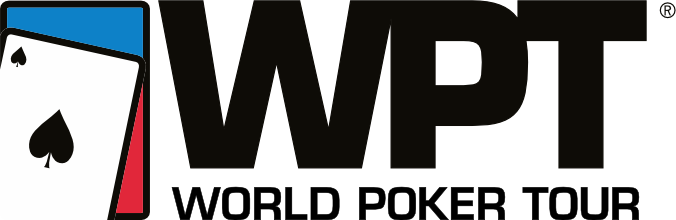 Logo der World Poker Tour